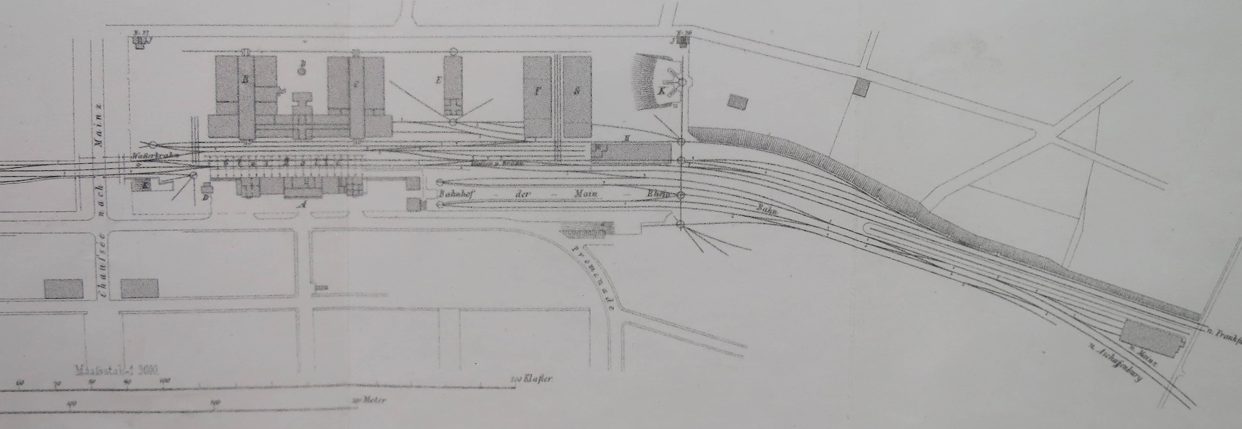 Gleisplan des Main-Neckar-Bahnhofs und der von der Hessischen Ludwigsbahn genutzten Gleise (unten) in Darmstadt. Zustand um 1870, vor dem Bau des Ludwigsbahnhofs.